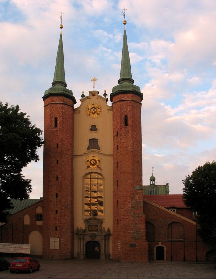 Katedra Oliwska (Bazylika archikatedralna w Gdańsku-Oliwie)